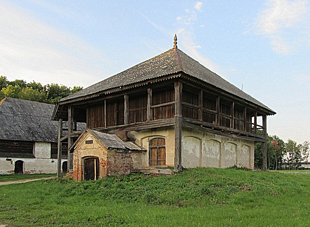 Вялікае Мажэйкава. Лямус